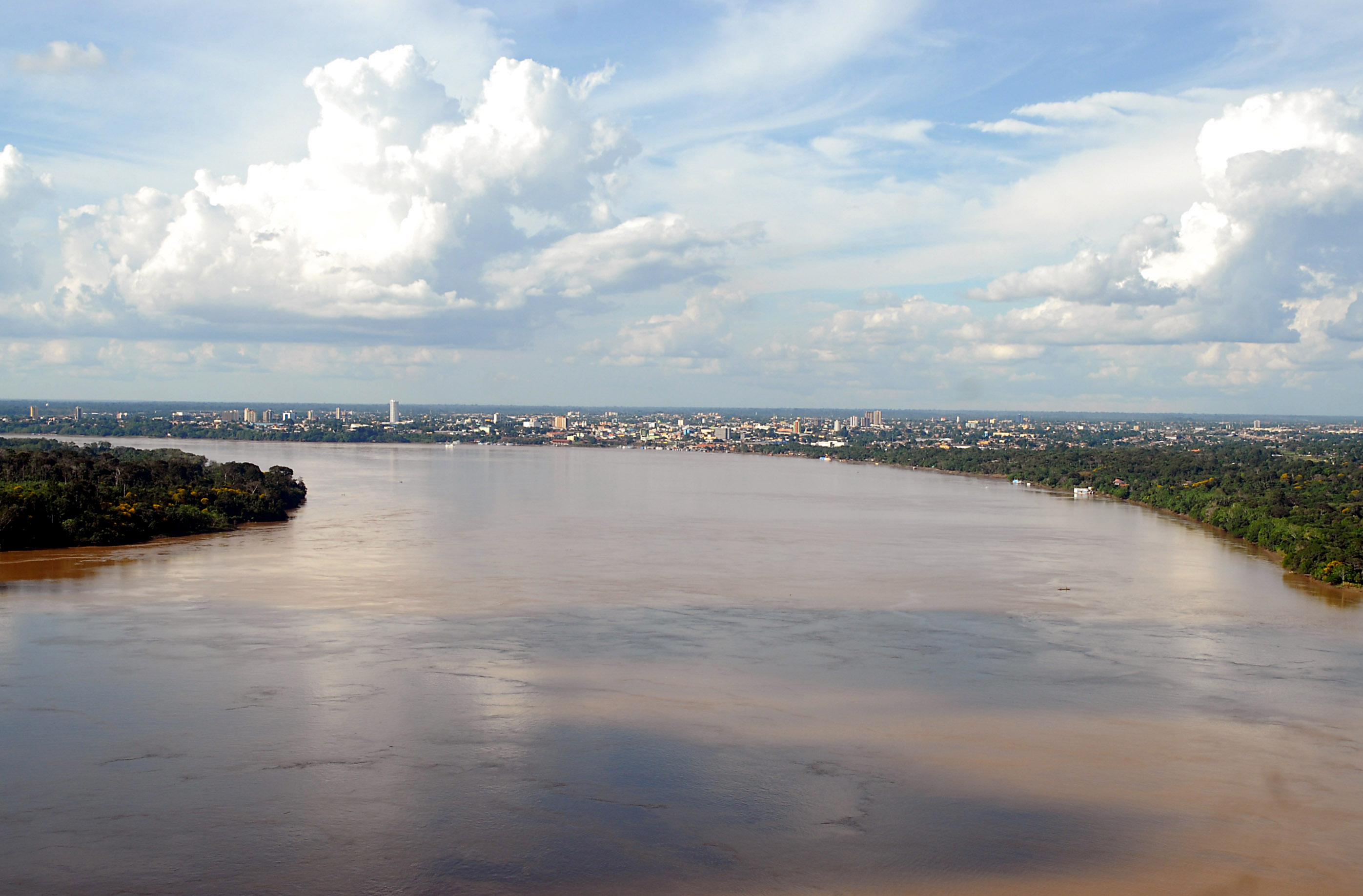 Vista aérea Rio Madeira. Ao fundo, a capital de Rondônia, Porto Velho.